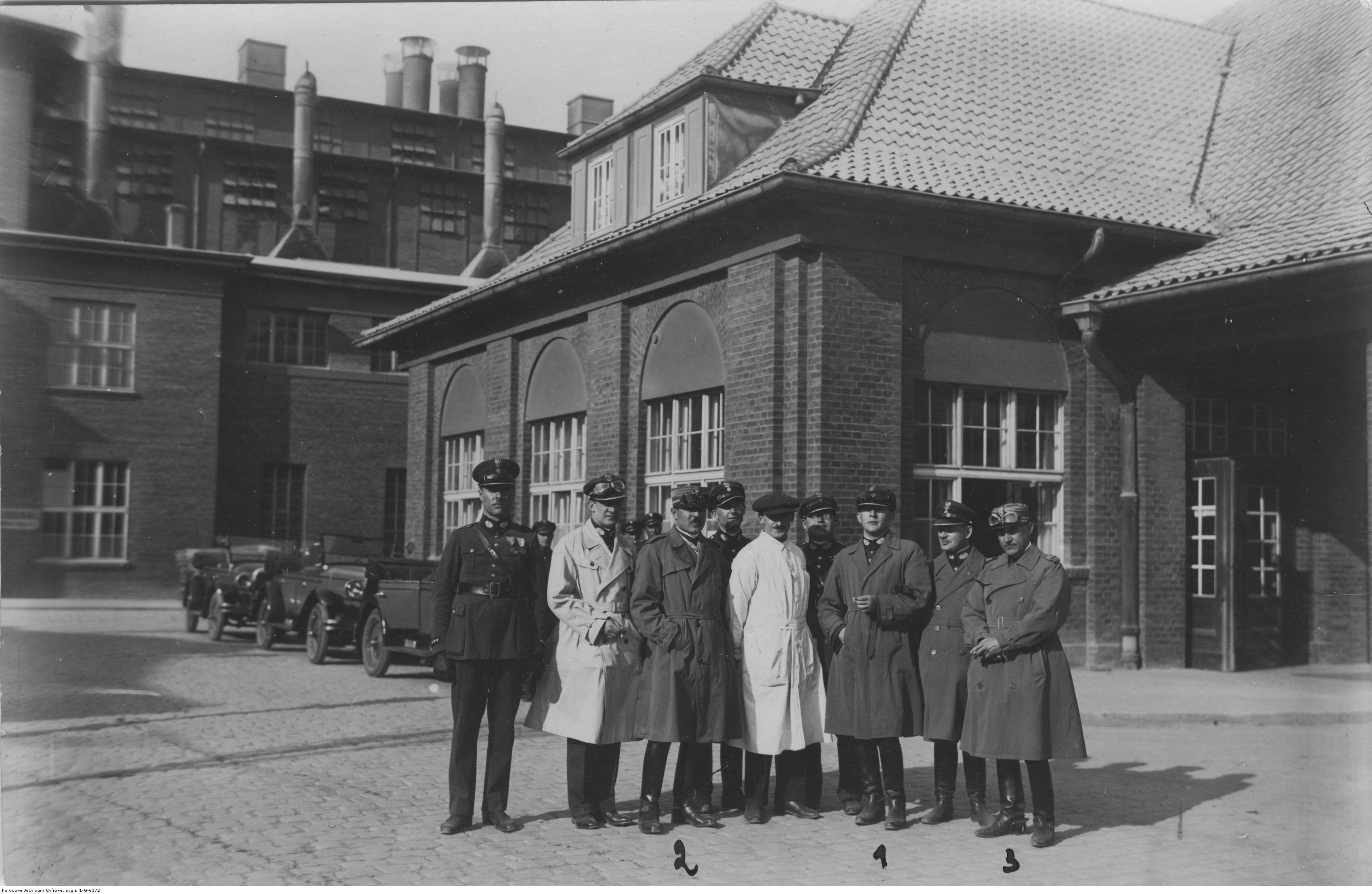 Oficerowie polskiej i rumuńskiej Straży Granicznej w Śląskim Inspektoracie Okręgowym; 1929 r. Widoczni m.in.: inspektor Wacław Spilczyński (1), mjr Jean Teodorescu (2), kpt. Jean Constantin (3). Koncern Ilustrowany Kurier Codzienny - Archiwum Ilustracji. Sygnatura: 1-G-6372